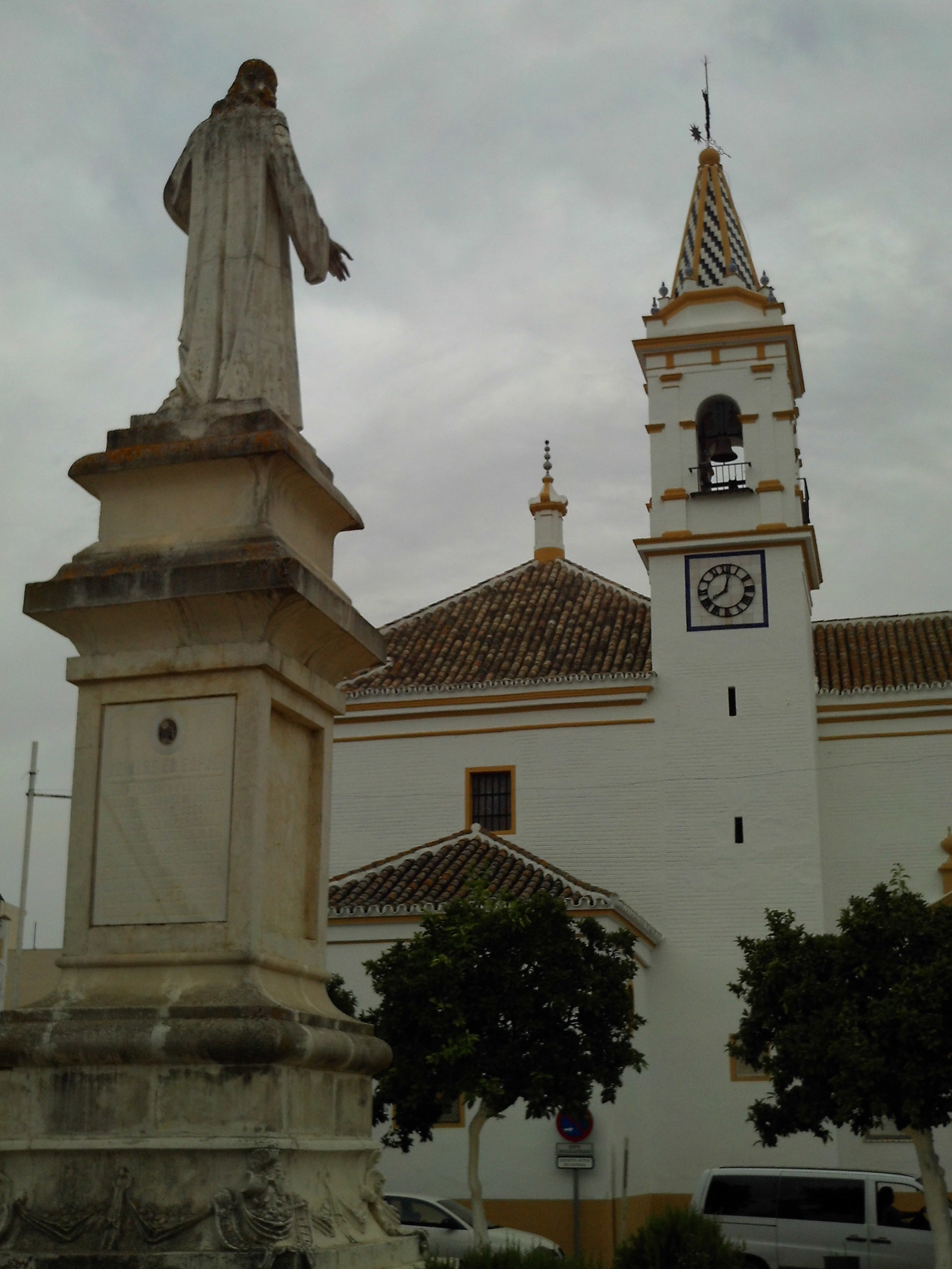 Monumento colocado el 25/6/1941 en la Fiesta de las Espigas con la iglesia de N. Sra. de la Estrella al fondo